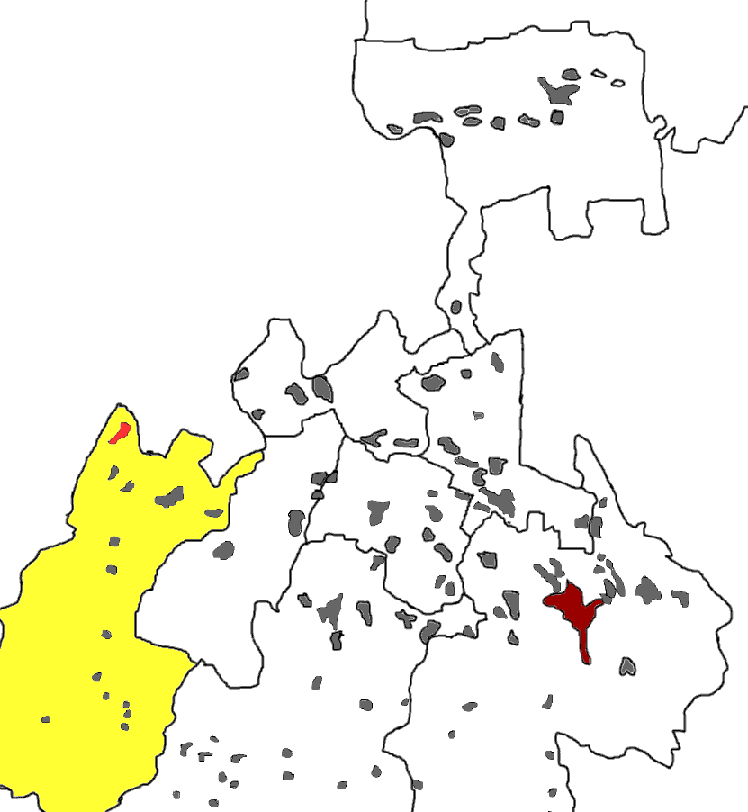 os: os:Лескен. ru: Крупное осетинское селение Лескен на западе Северной Осетии.